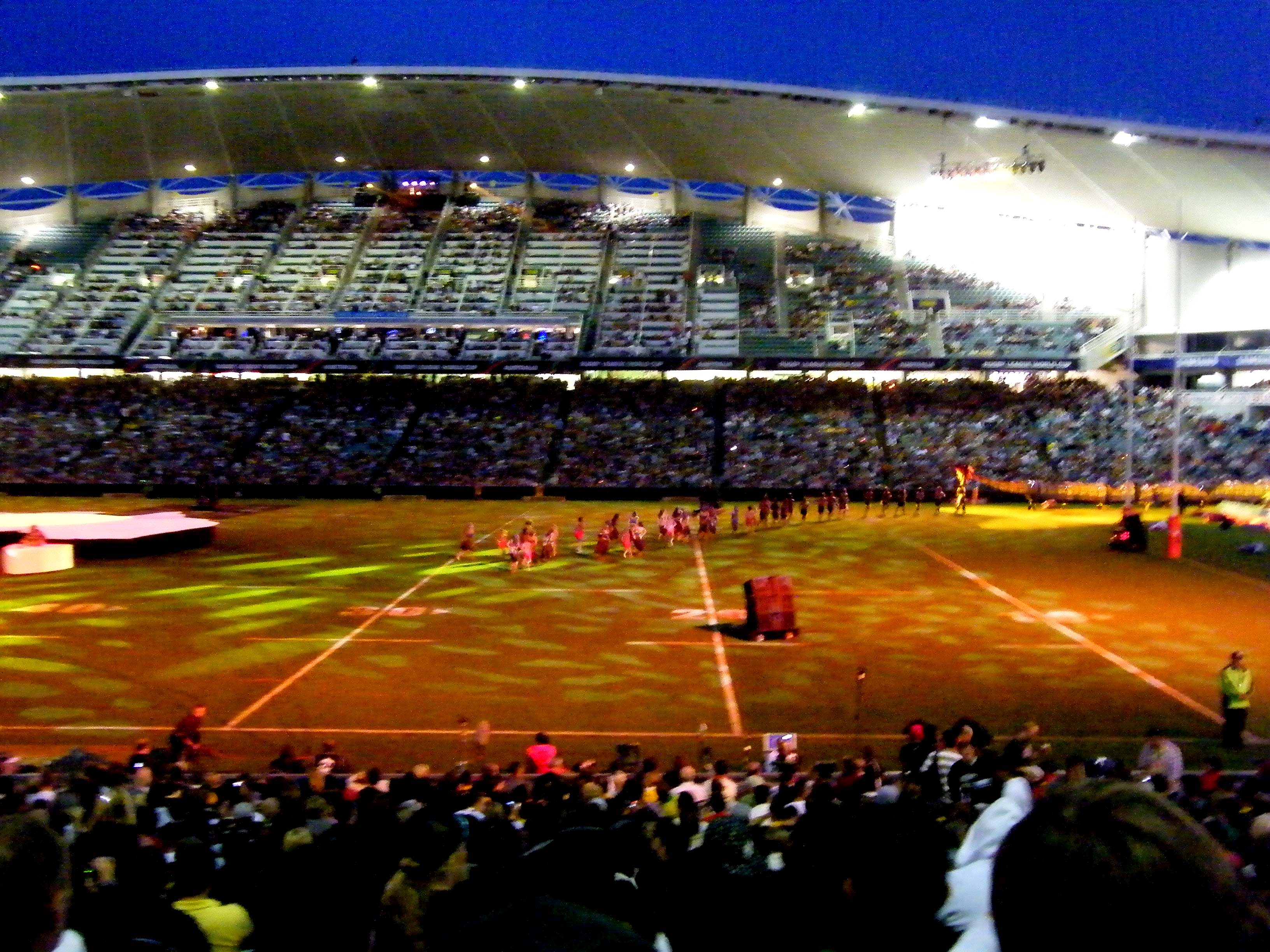 Aussie Stadium, Sydney.